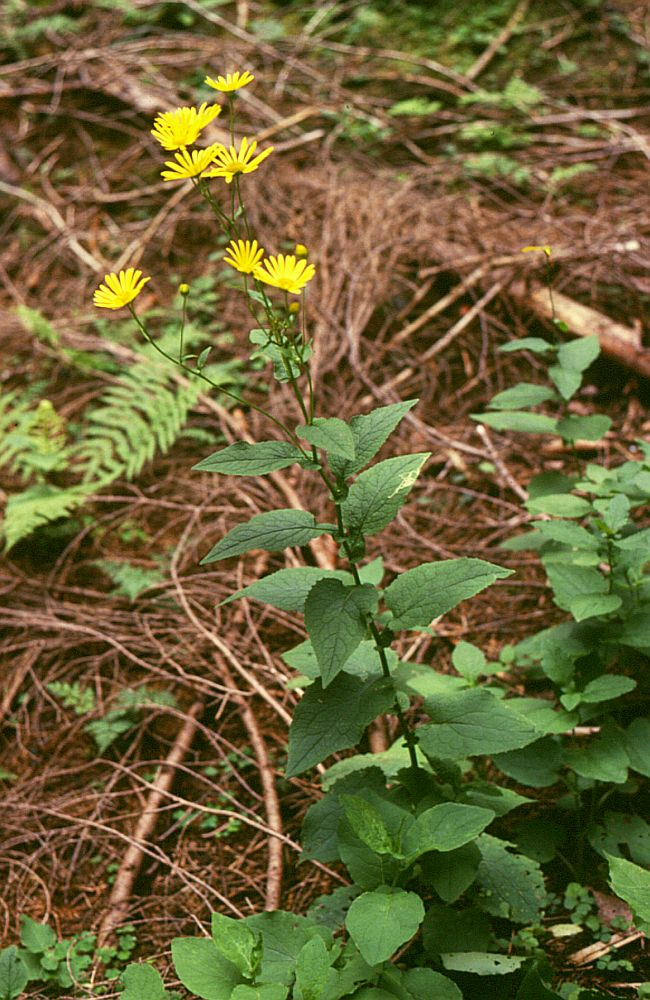 Österreichische Gamswurz (Doronicum austriacum), Korbblütler (Asteraceae) - Österreich/Austria/Autriche: Niederösterreich, Oberes Ybbstal, „Auf den Mösern“ SW Neuhaus